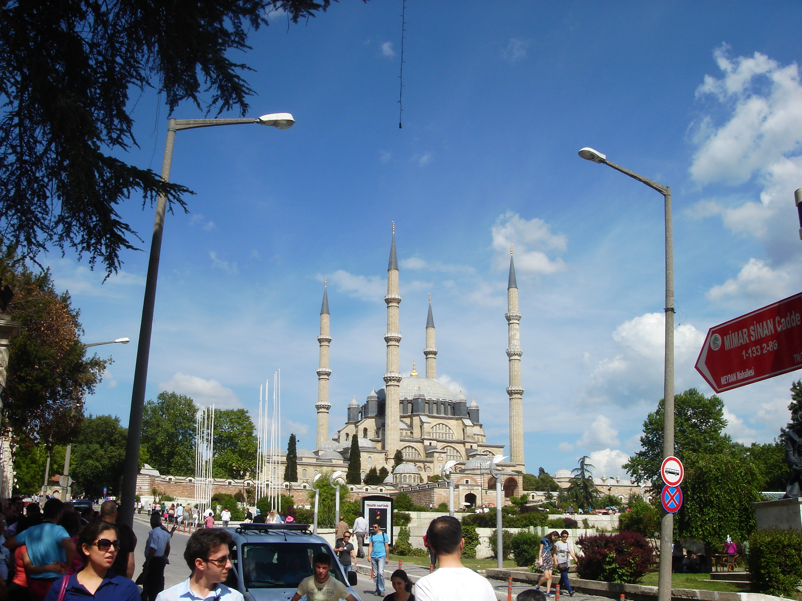 Edirne Selimiye camii